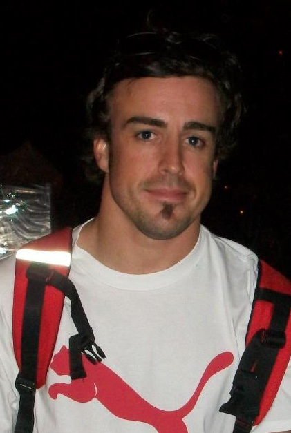 Fernando Alonso di Malaysia 2012